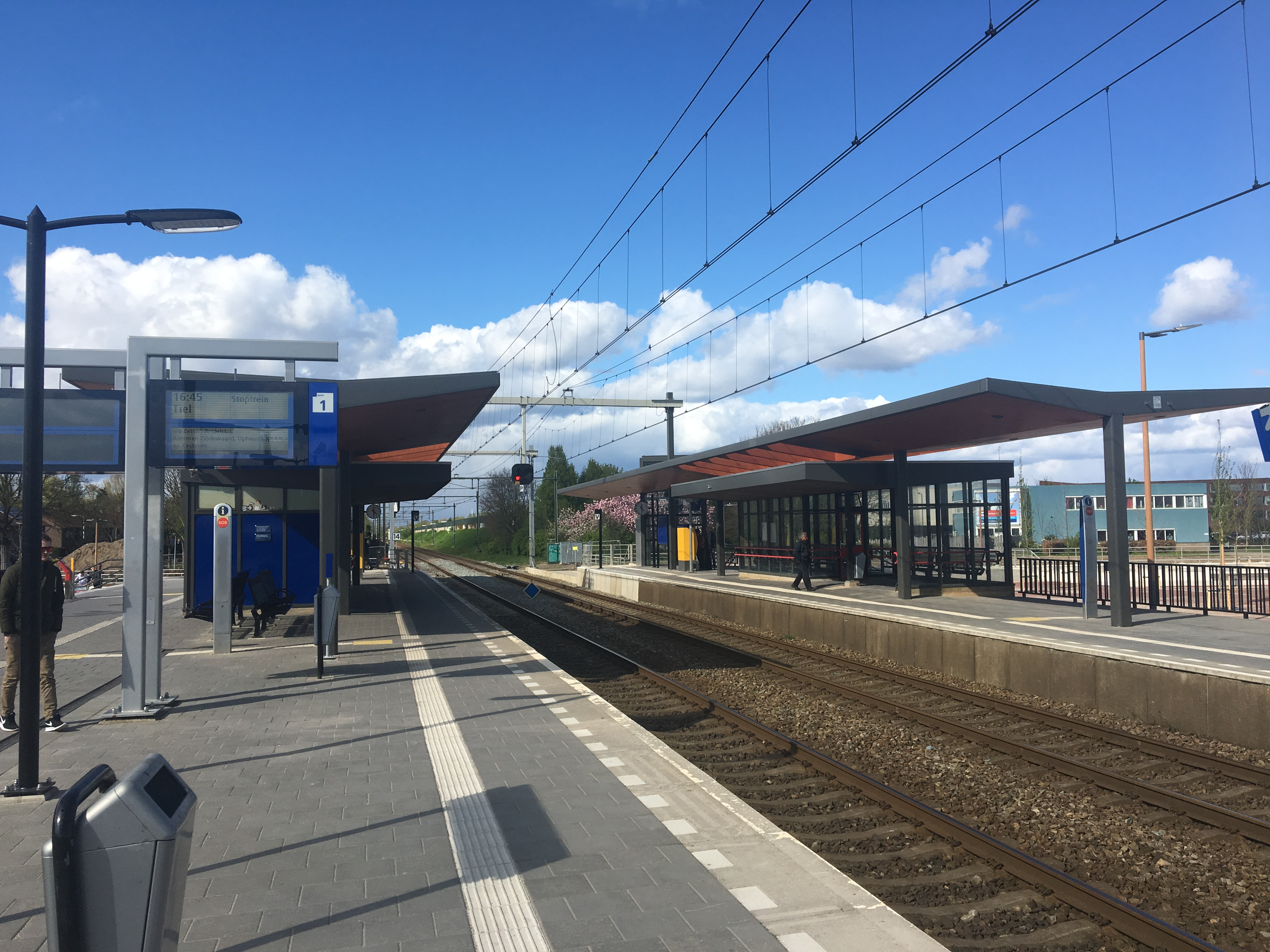 De oude stationsgebouwtjes van station Elst zijn verweven in de nieuw gebouwde luifels op de perrons.